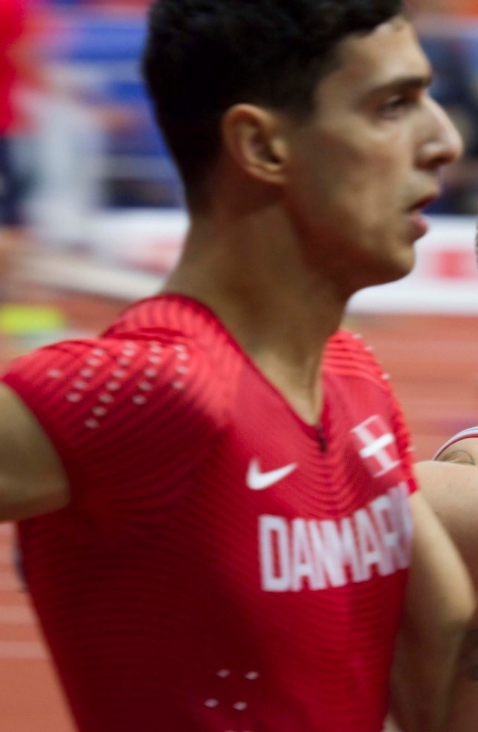 _266 series 400m maslak